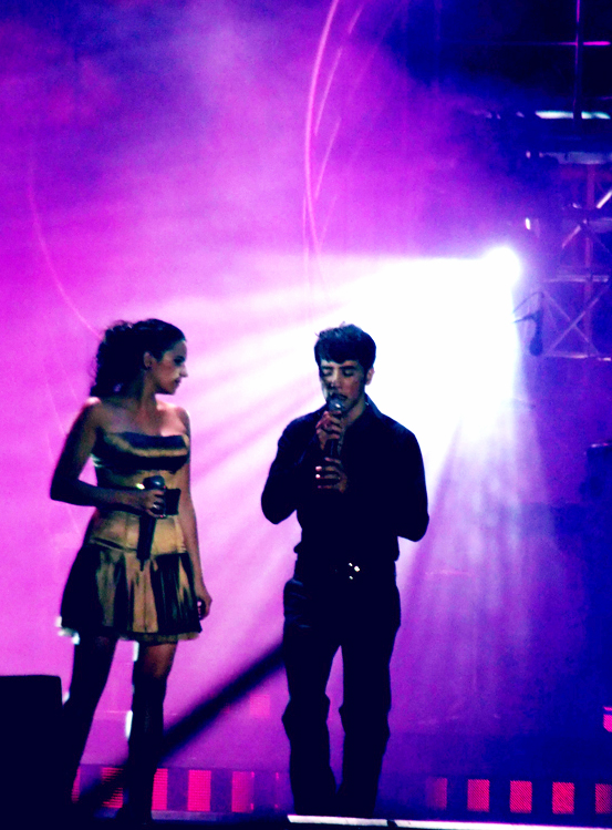 Maya rotman & Harel skaat, 'Volume Tel-Aviv' 2006